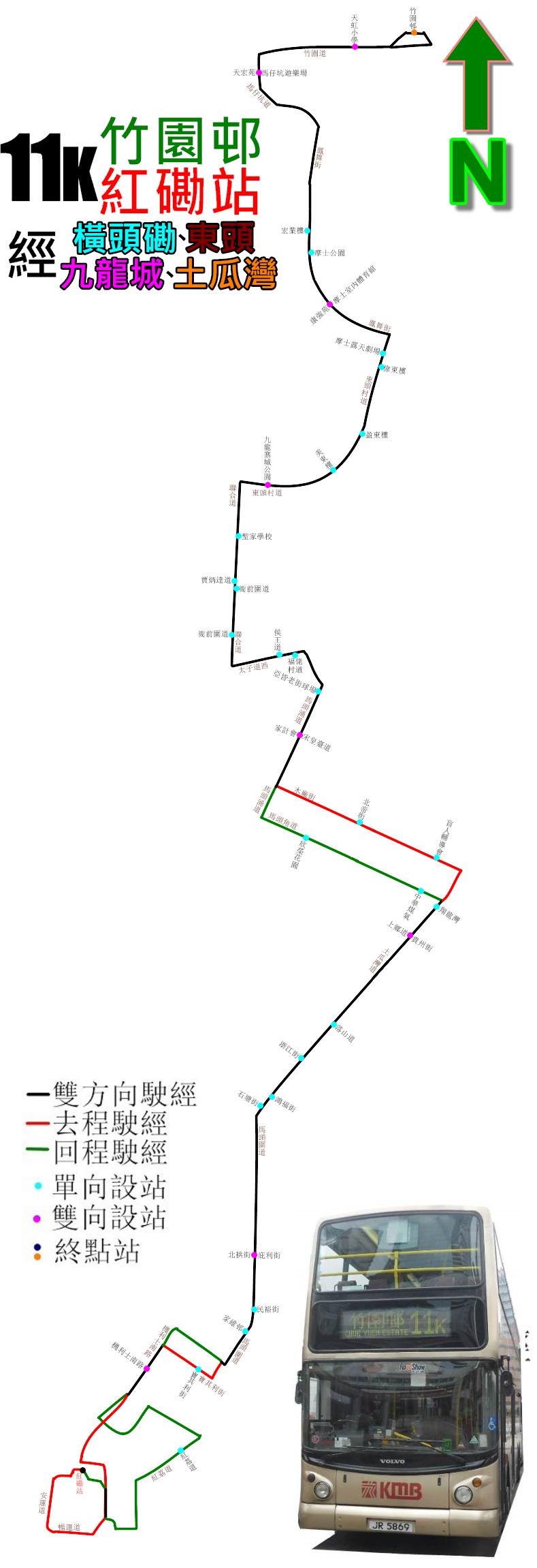 中文（香港）: 九巴11K線的走線圖